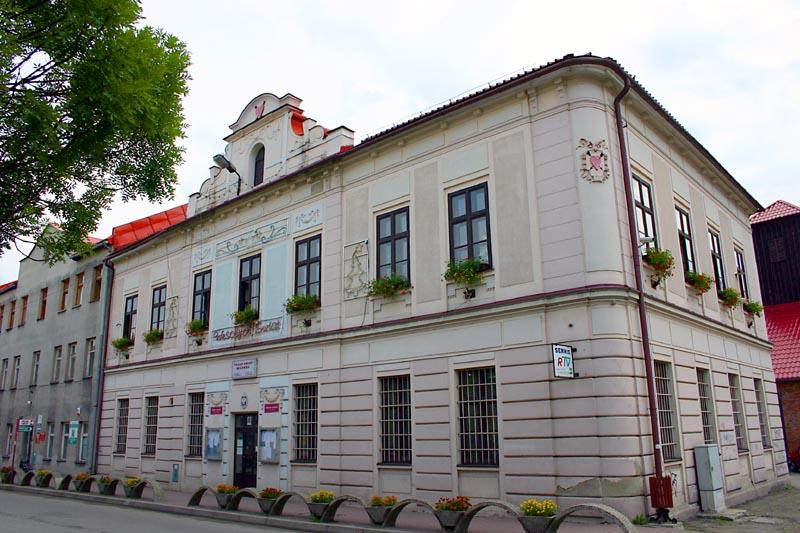 Milówka (Polska)